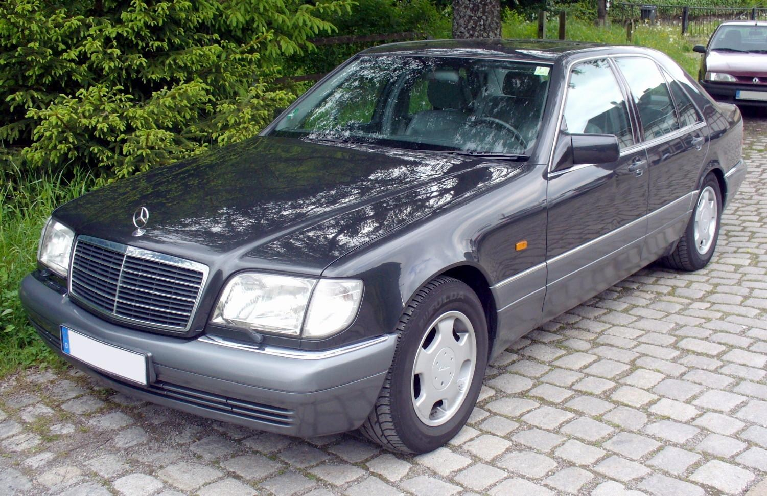 Mercedes-Benz W140